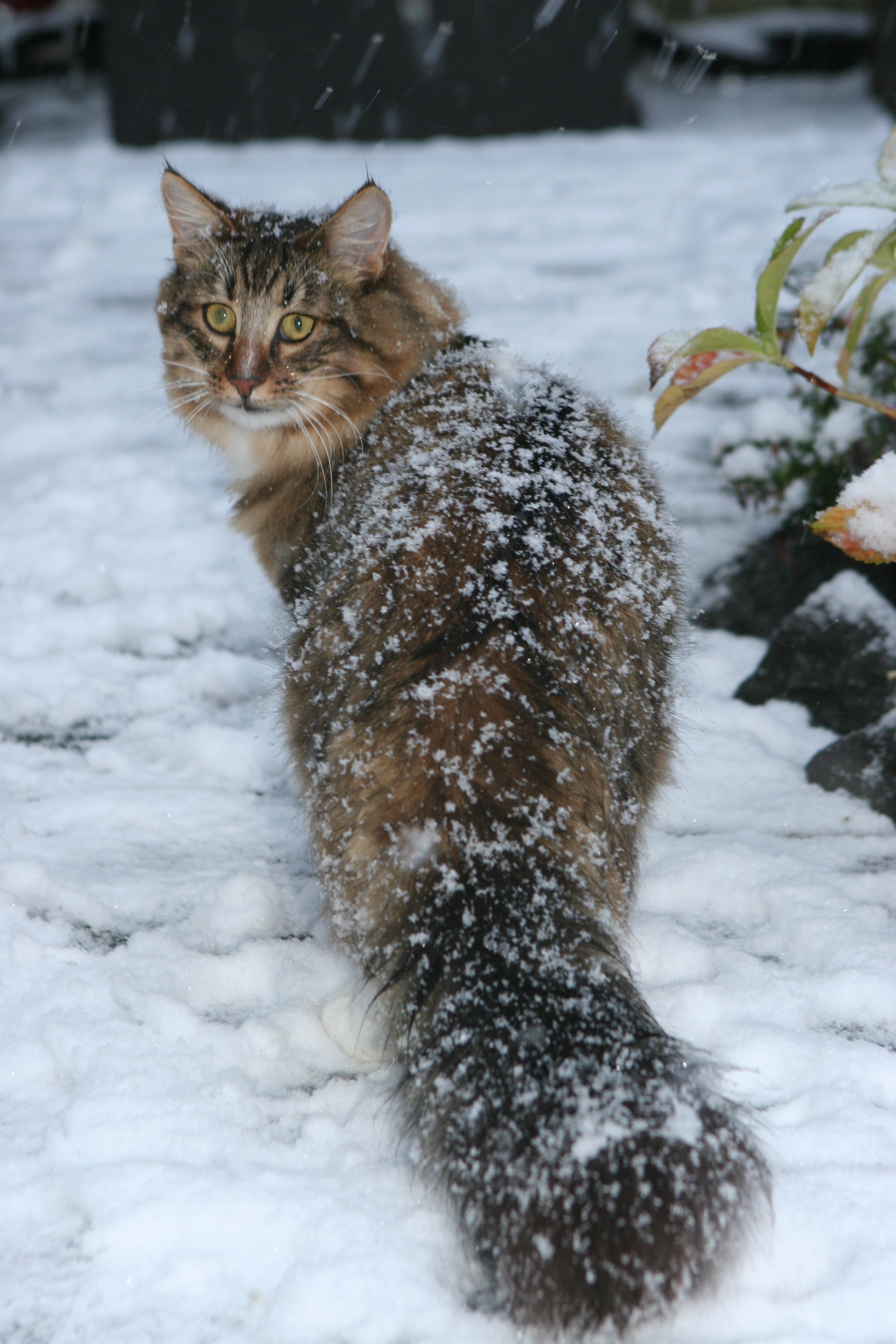 Norvégien sous la neige.